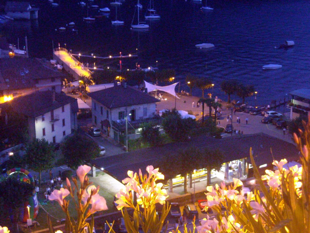 Vista notturna di Caldè dalla Rocca